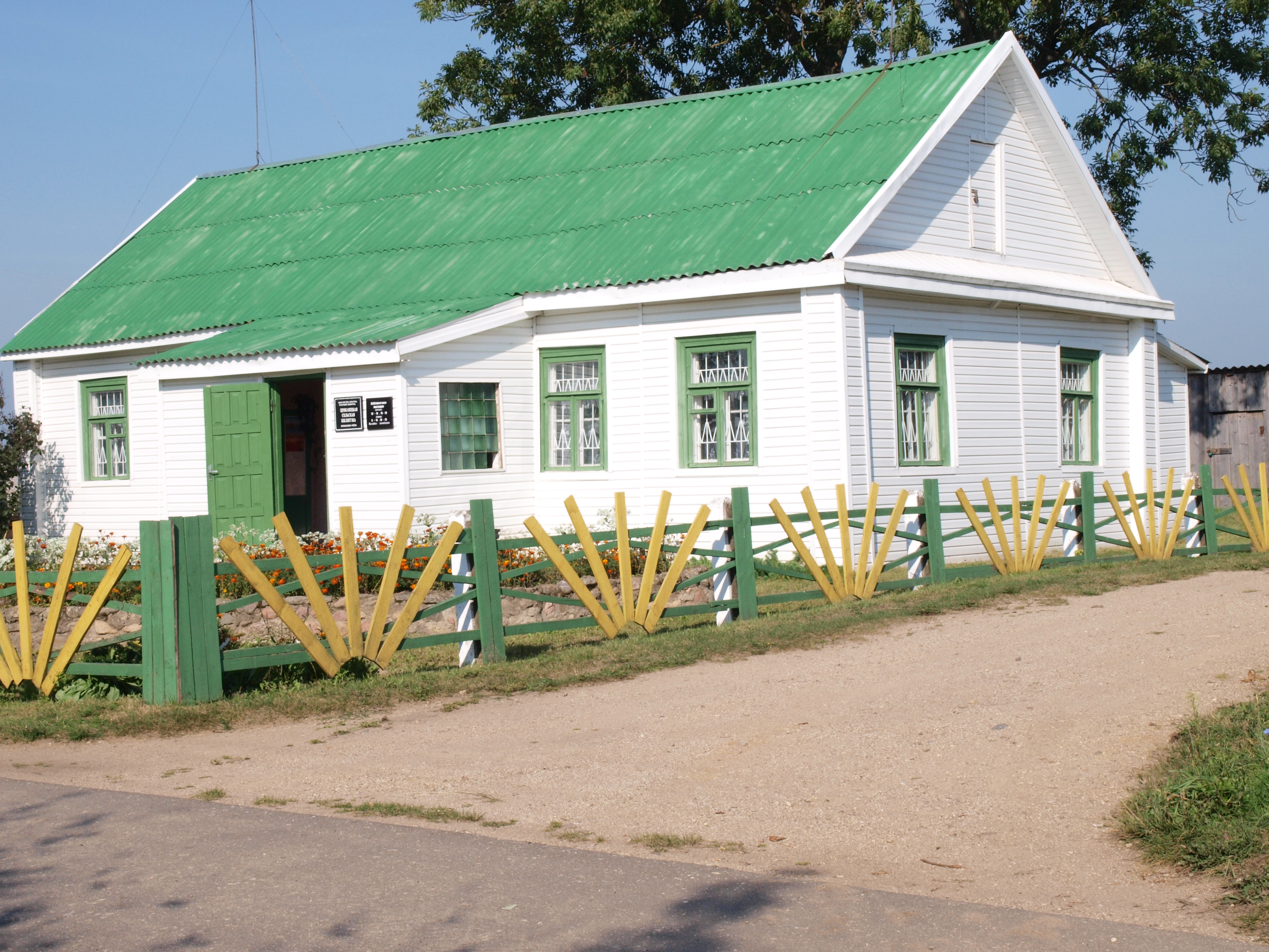 Тимковичская сельская библиотека.